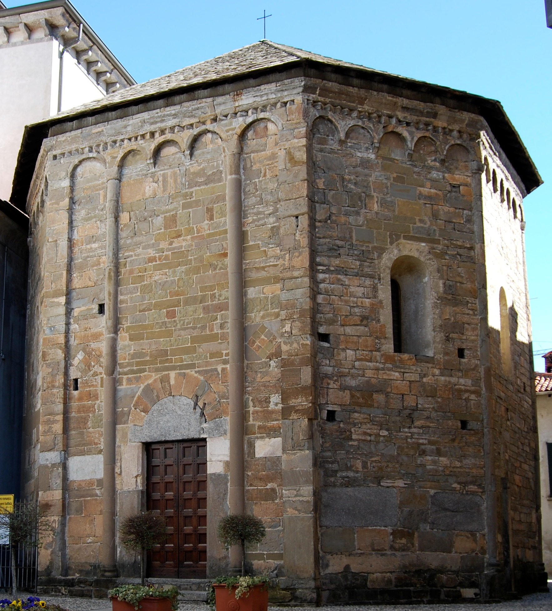 Veduta esterna del Battistero, a fianco della Chiesa di Sant'Eufemia